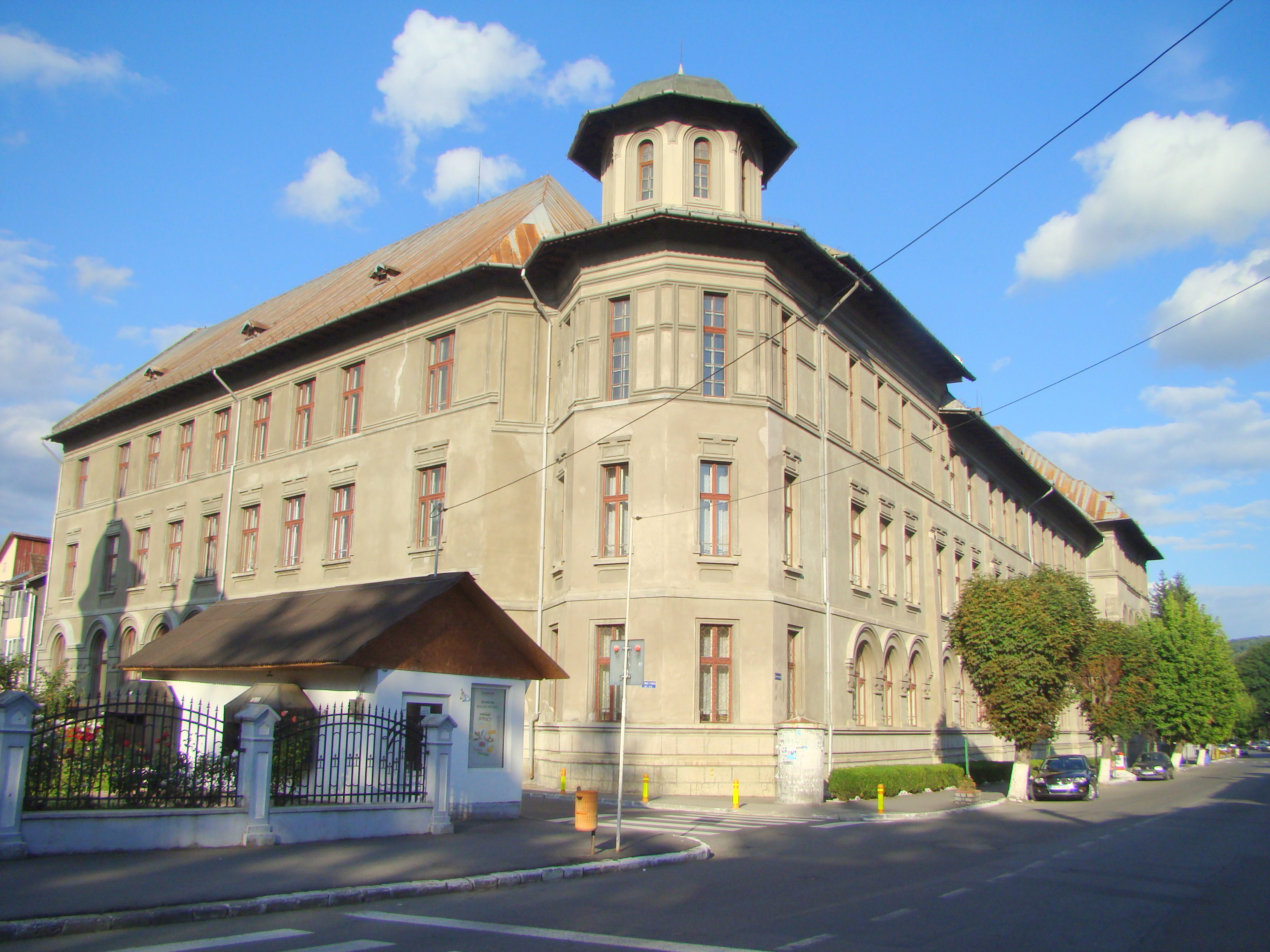 Internatul școlii Normale, azi Școala Generală „Mihai Eminescu”, oraș Năsăud, Bd. Grănicerilor 15